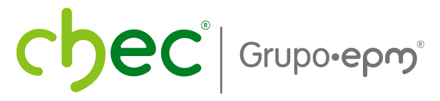 Logo de la Central Hidro-Eléctrica de Caldas